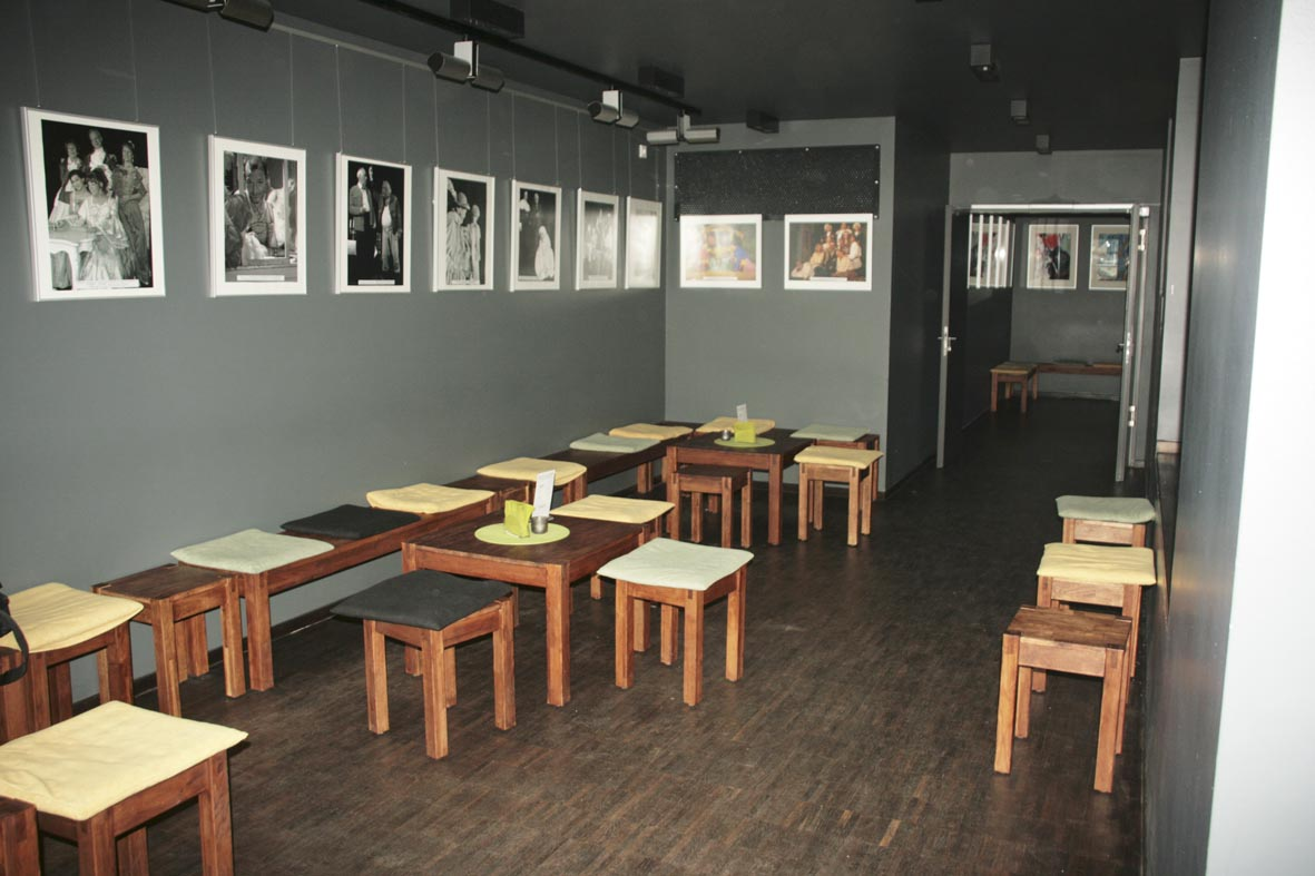 Foyer des Theaters